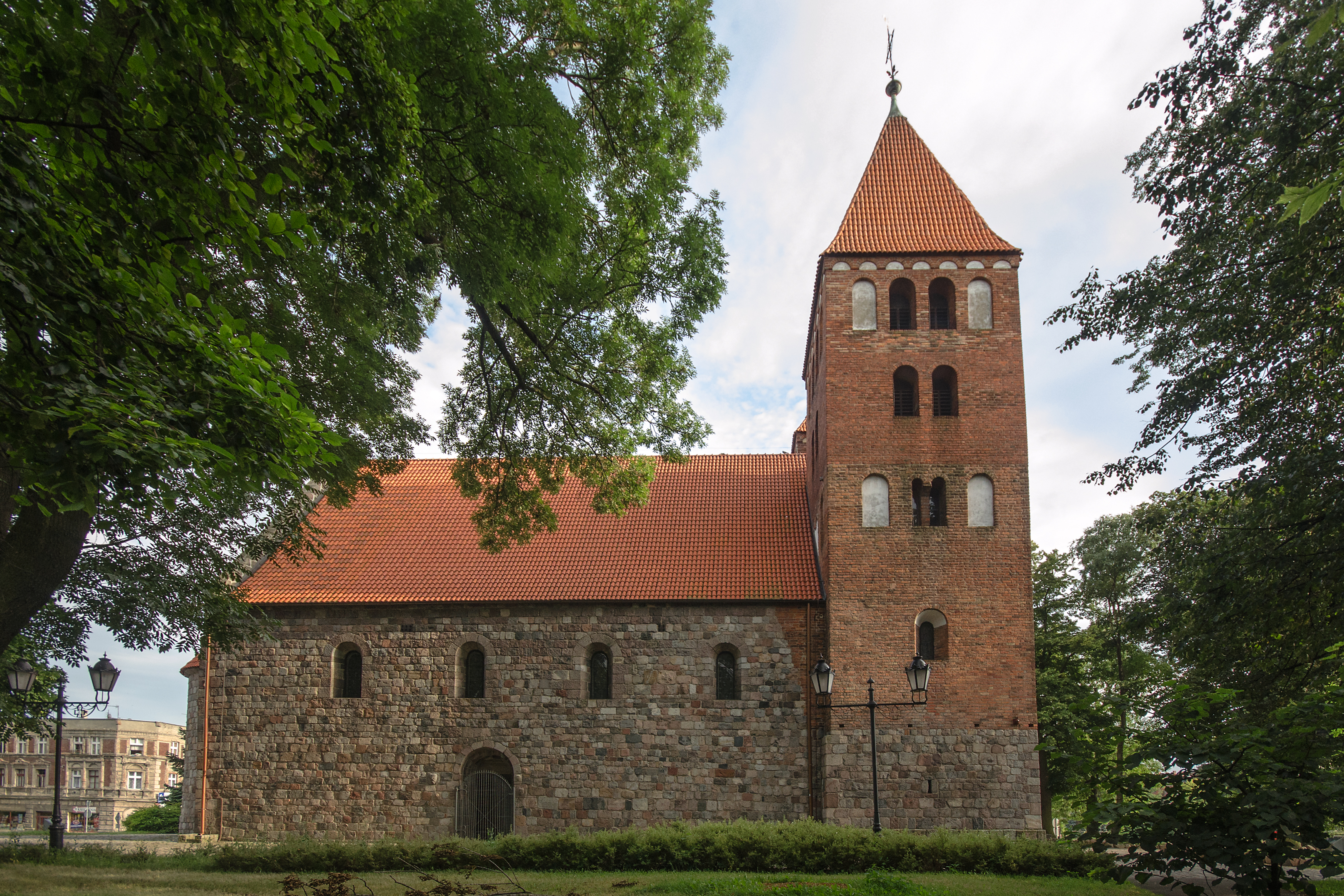 Inowrocław, kościół par. p.w. NMP, XII-XIII, 1901, 1950-1952